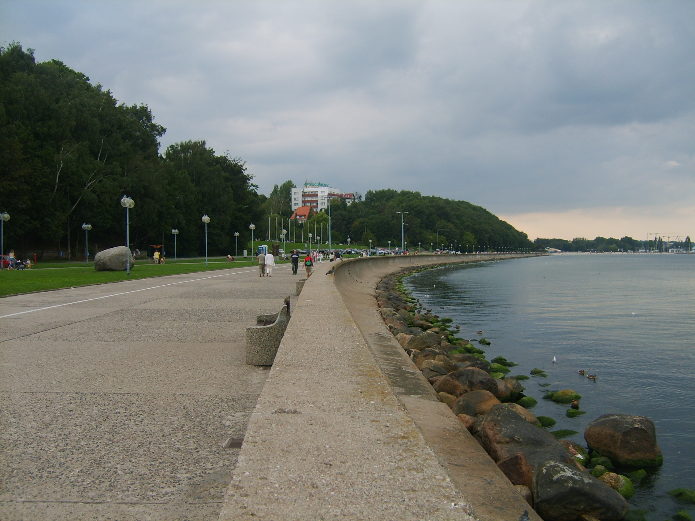 Bulwar Nadmorski